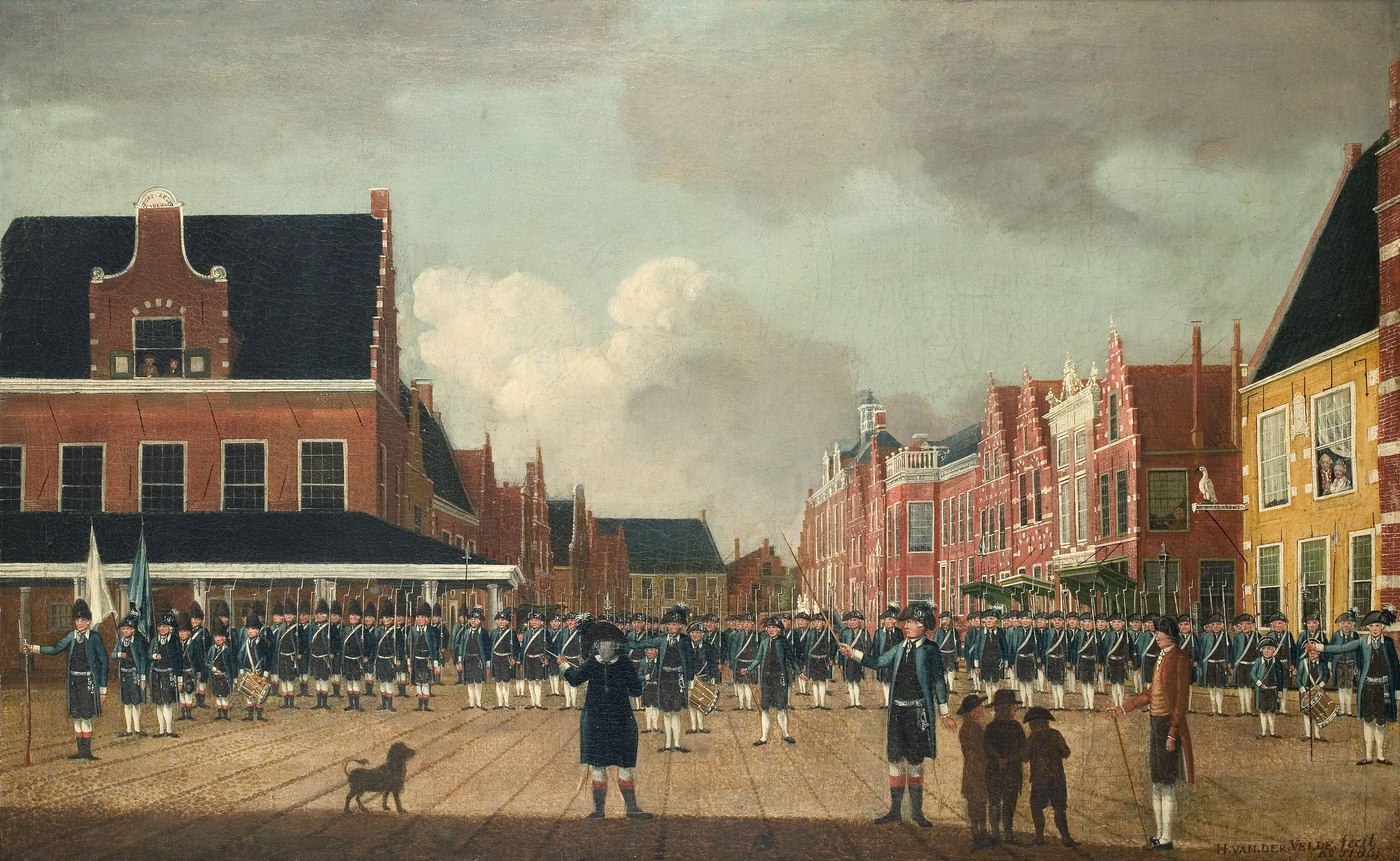 De wapenskouwing fan it frijkorps Snits